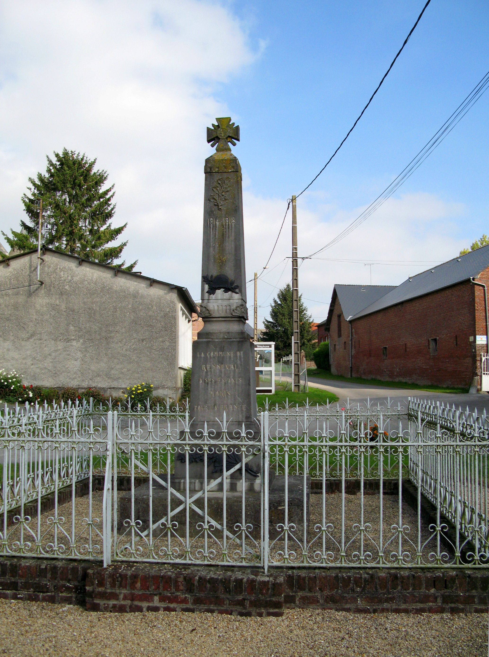 Renneval (Aisne, France) - Le monument-aux-morts.